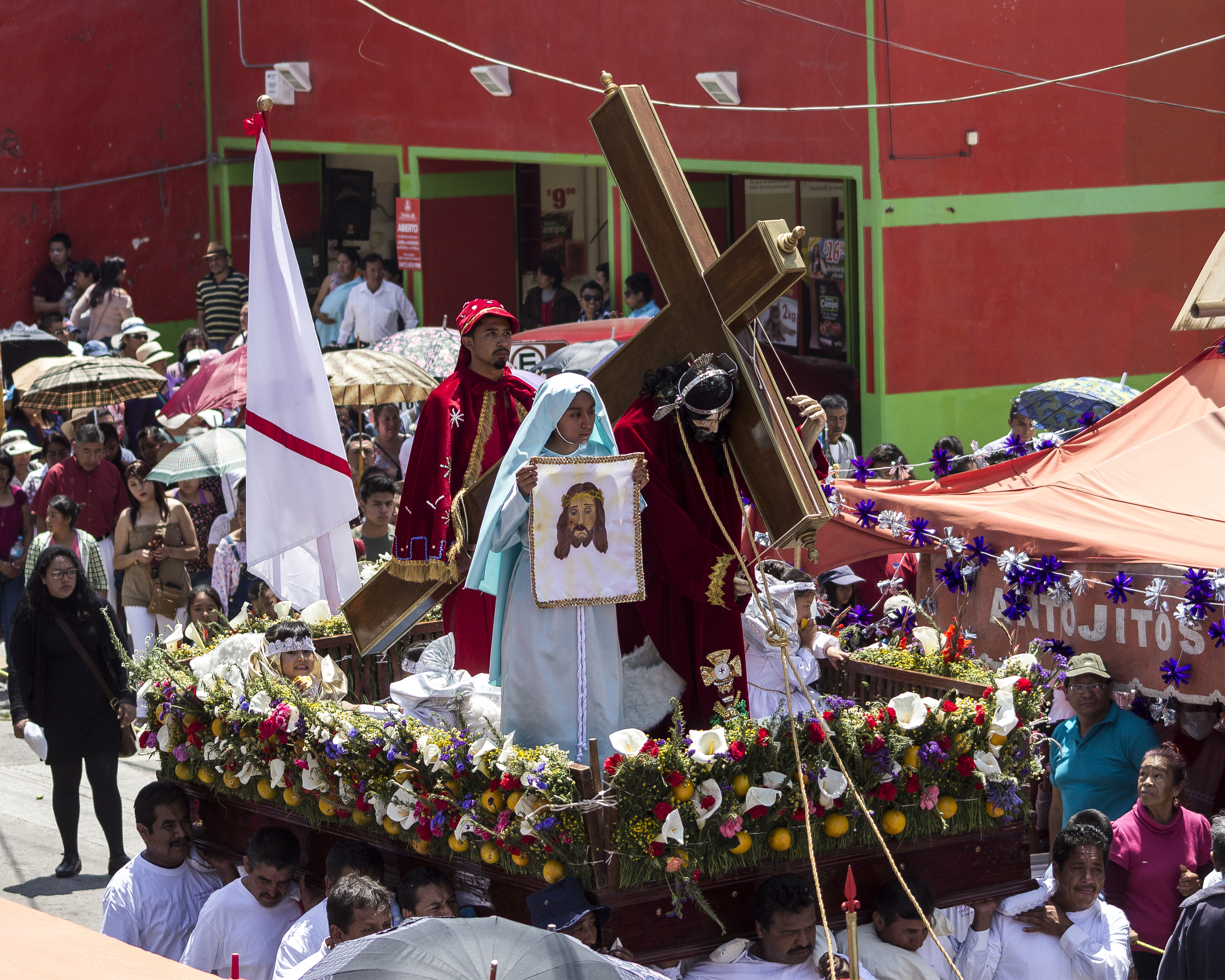 Figura de Cristo desfila en las calles de Tlaxcoapan Hidalgo durante la representación del viacrucis